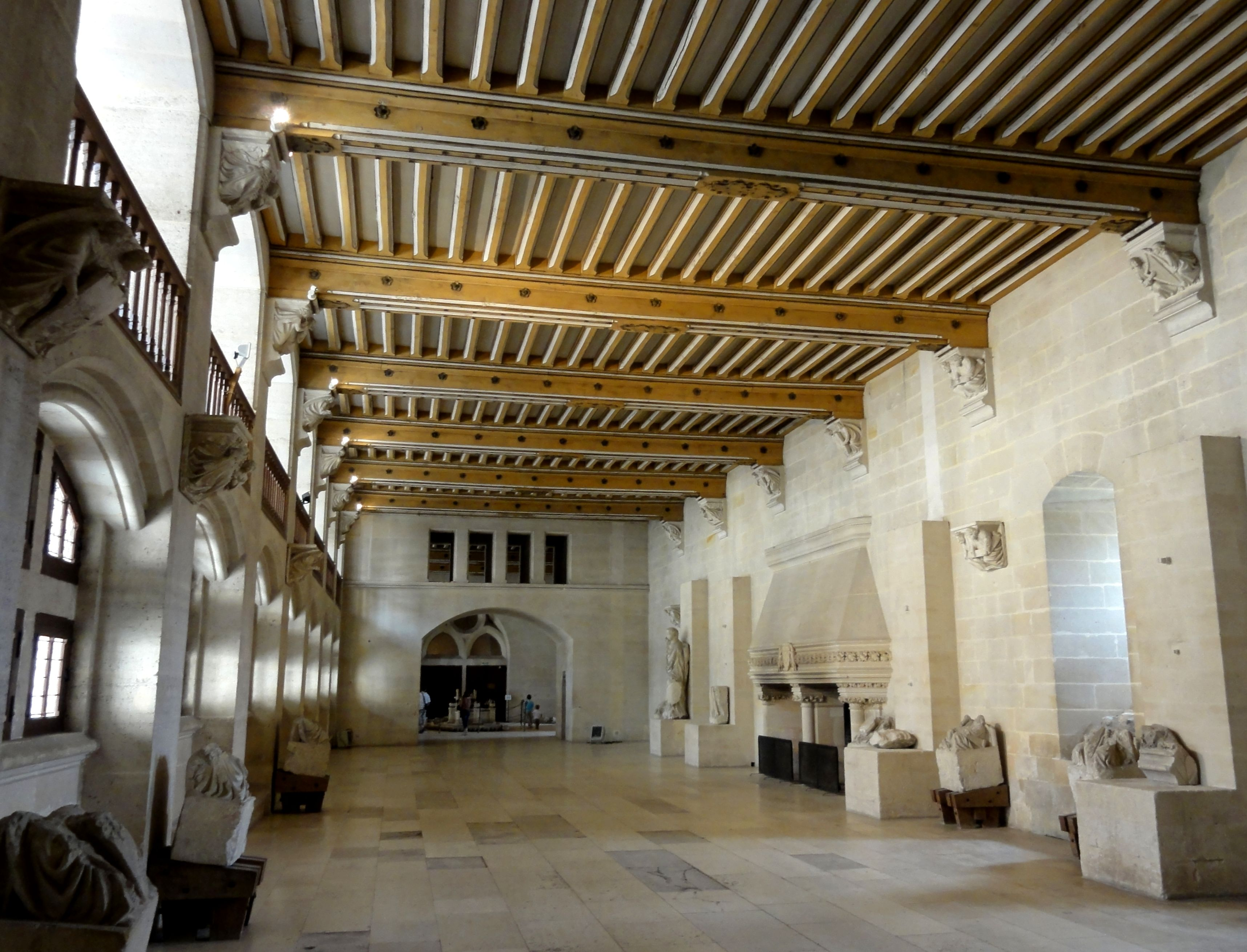 Salle des Gardes.